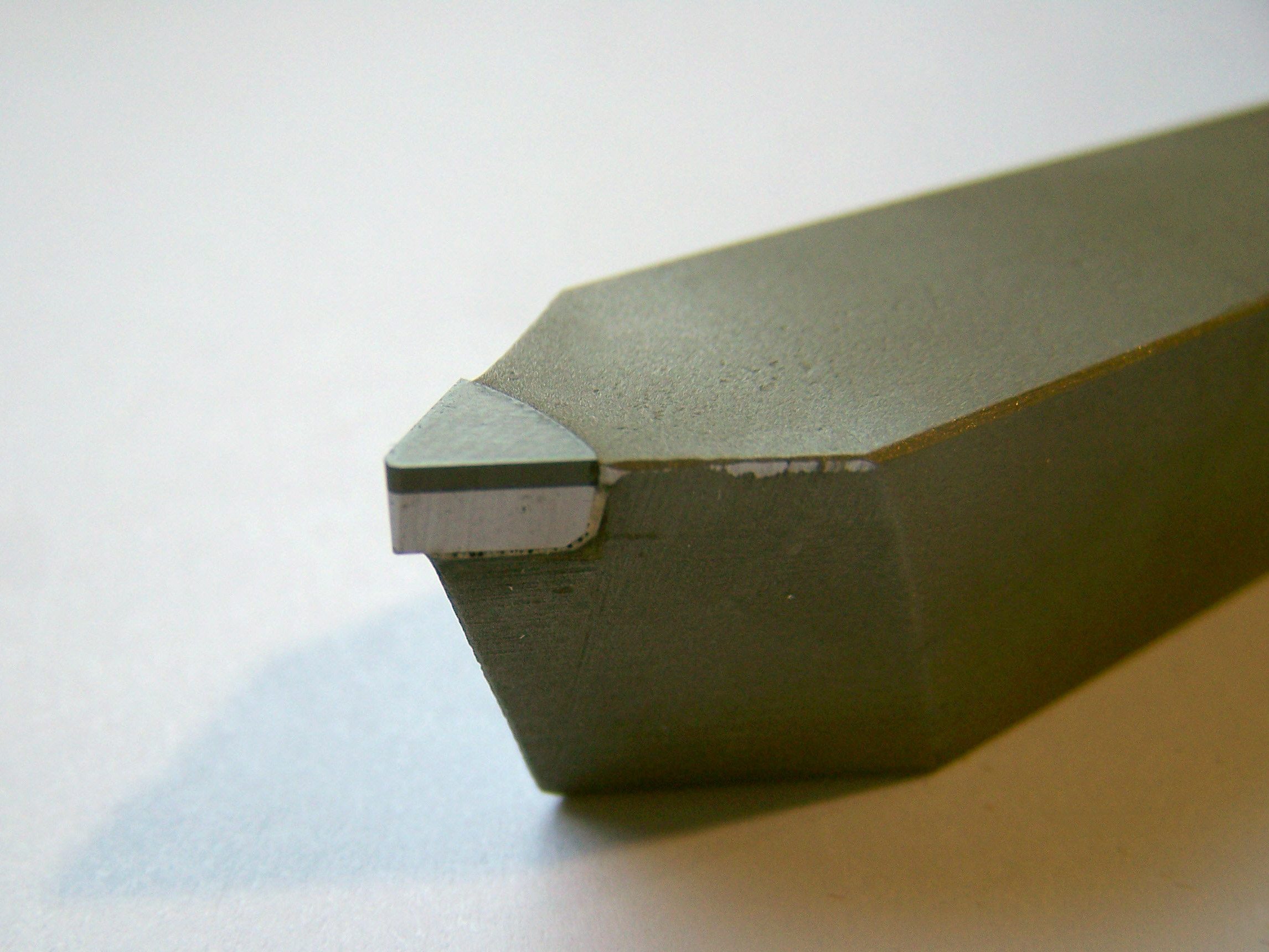 PolyKristalinerDiamant